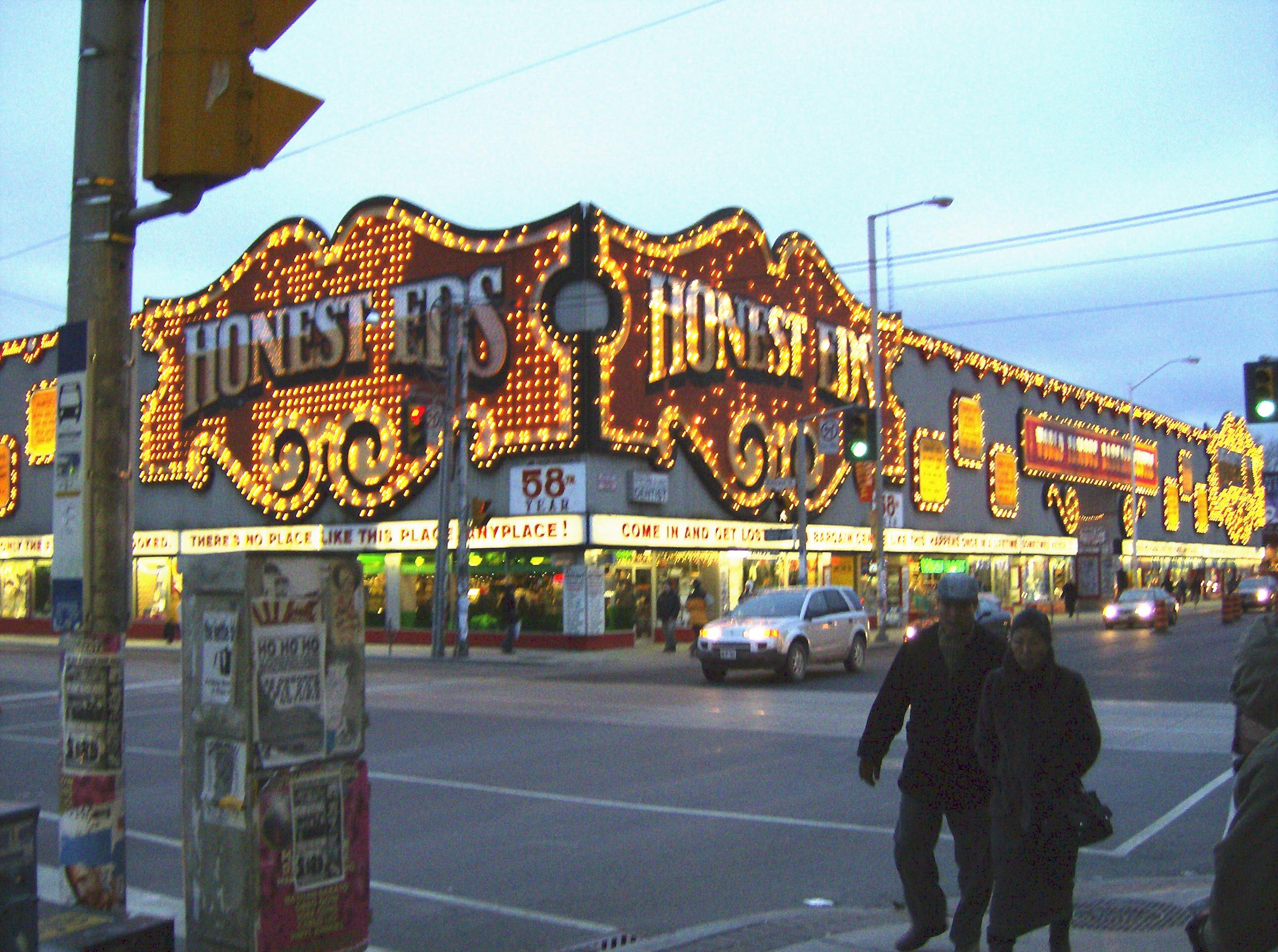 self made